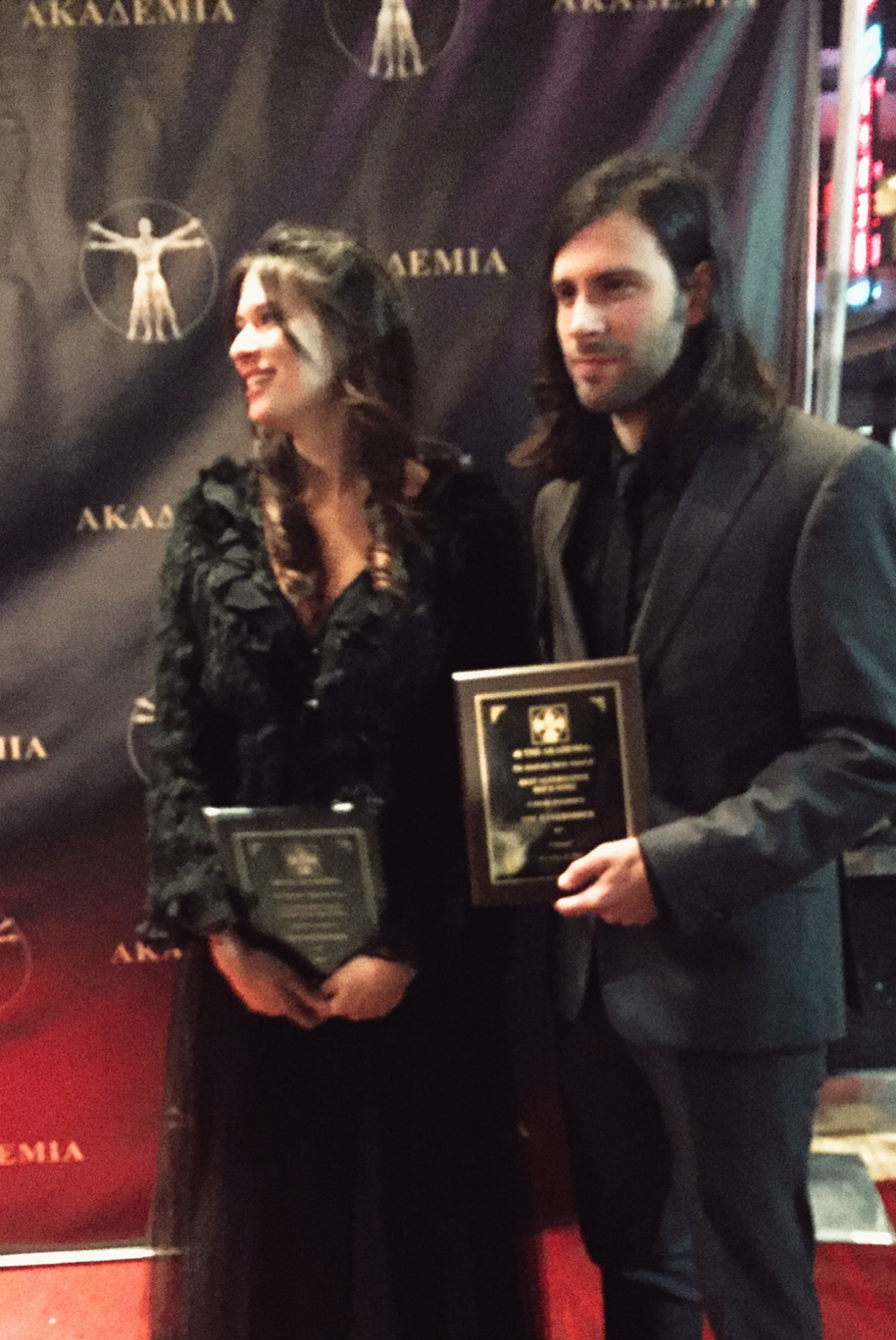 The Bankrobber Los Angeles Akademia Music Award 2017